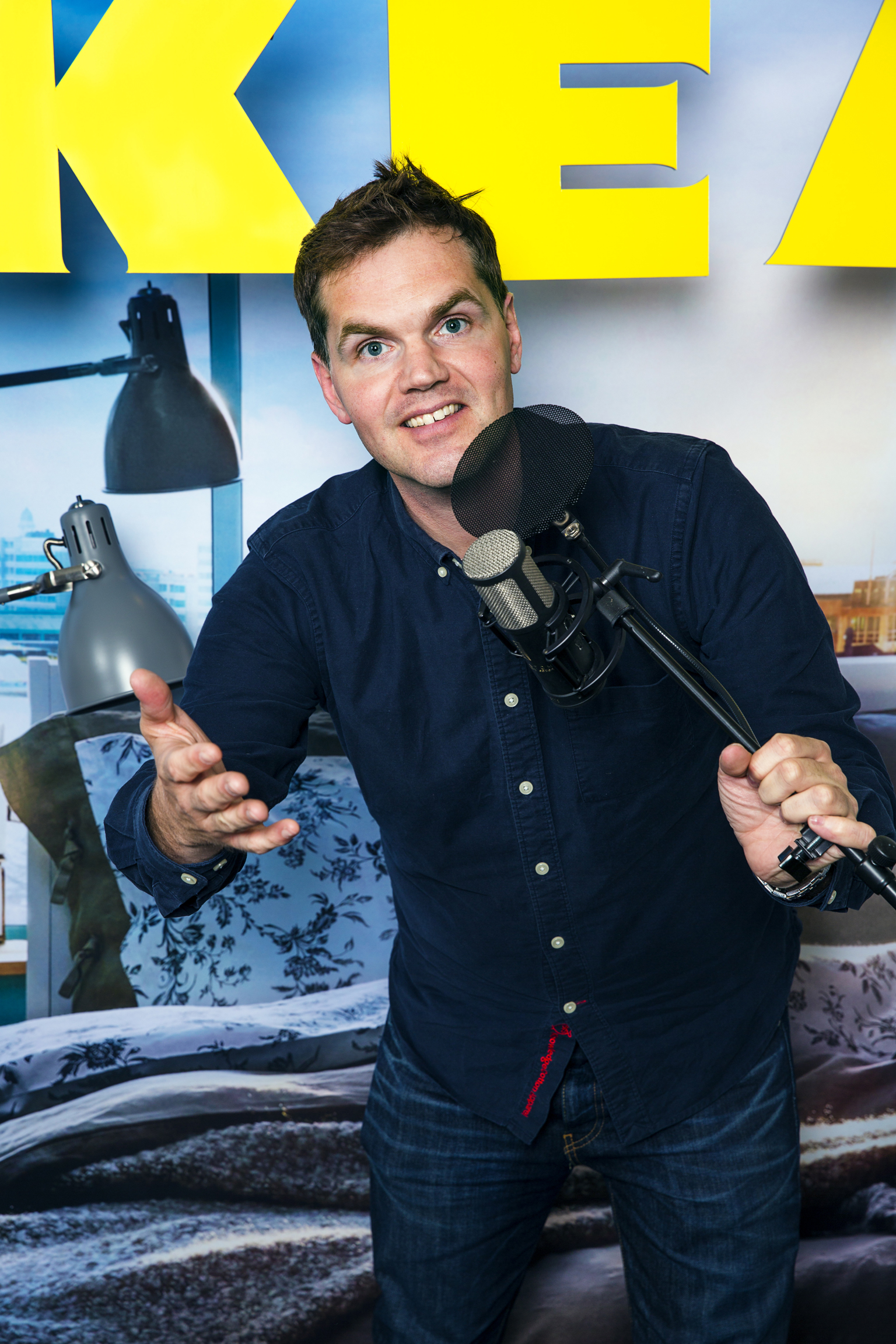 Radiomannen Kjell Eriksson i ett promofoto för IKEA:s podcast.